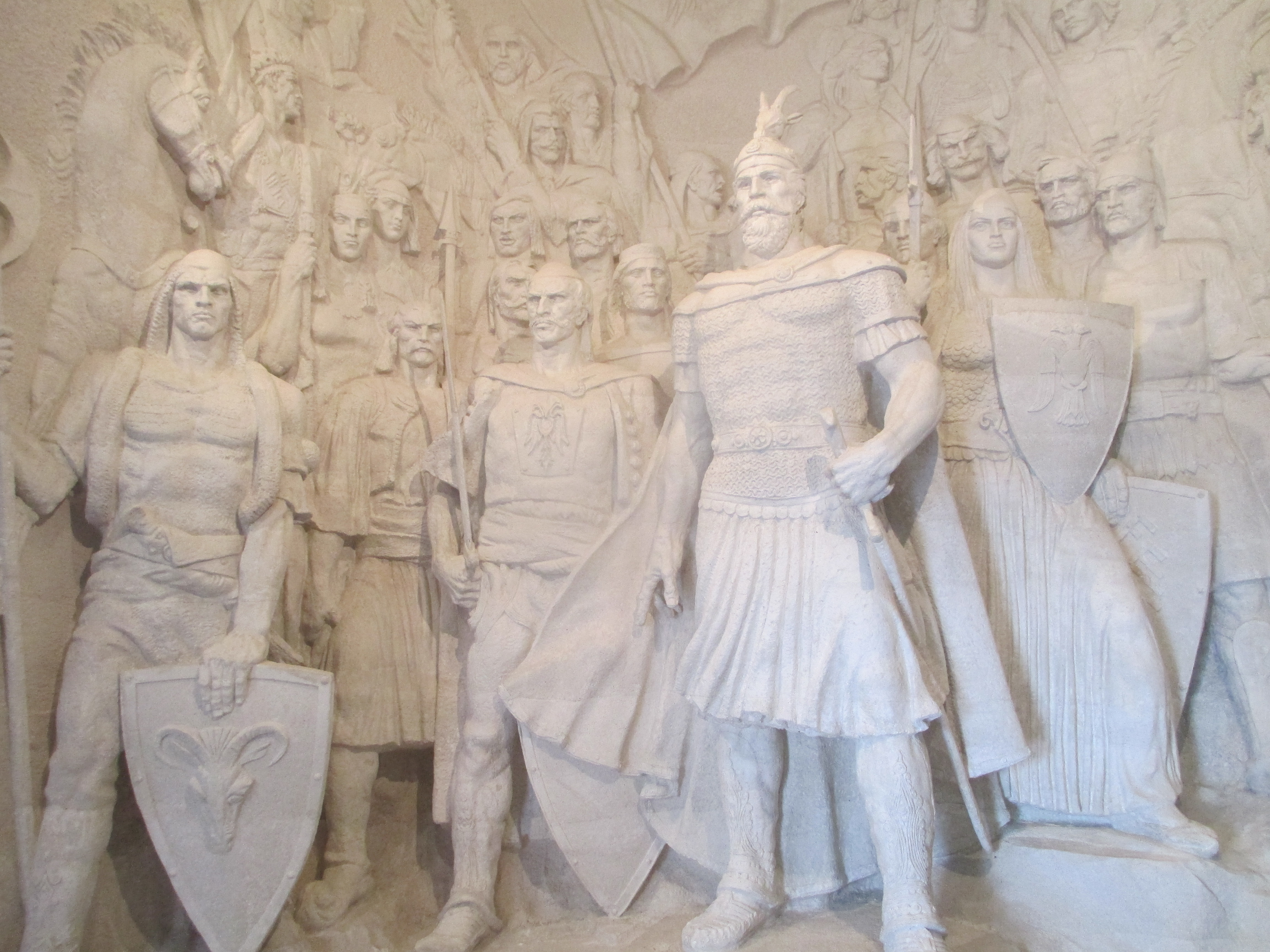 סקנדרבג ולוחמיו במוזיאון סקנדרבג בקרויה